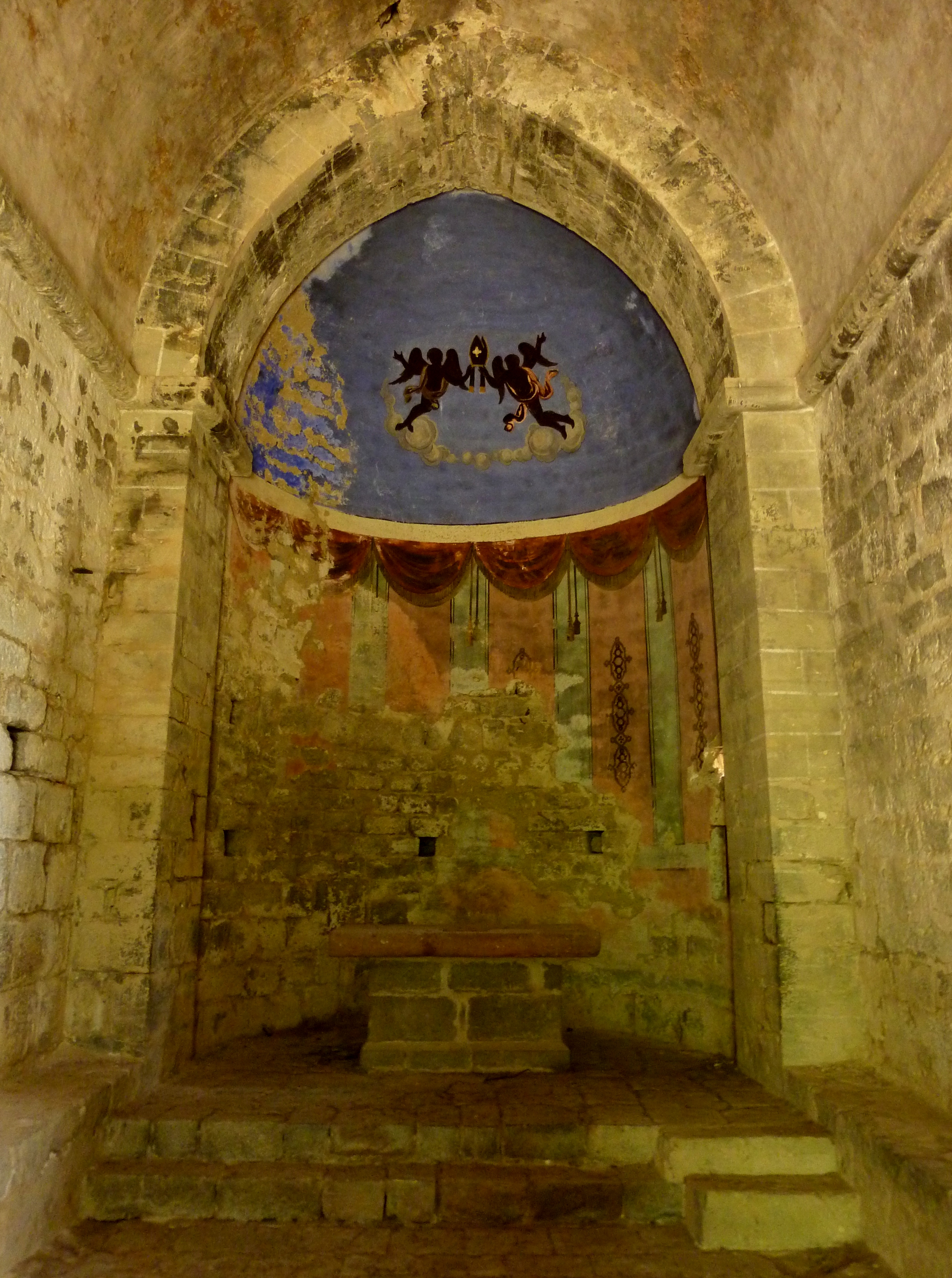 Fotografia de l'aspecte interior de l'absis - decorat amb pintures murals -; presbiteri i altar de Sant Martí de Corsavell al municipi d'Albanyà (Alt Empordà)